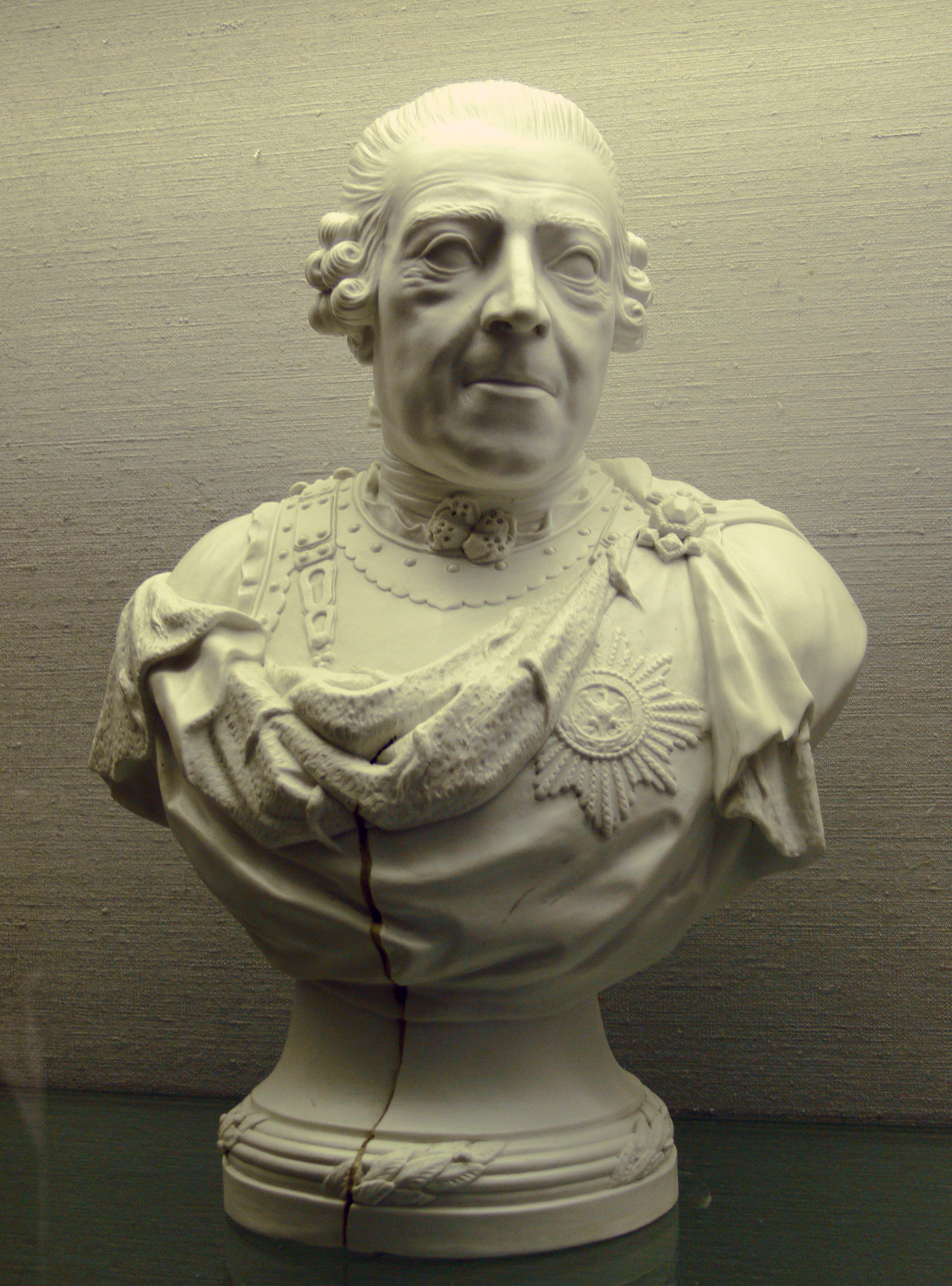 Friedrich Elias Meyer: Friedrich der Große, Königliche Porzellan-Manufaktur Berlin, 1778 Kunstgewerbemuseum Berlin